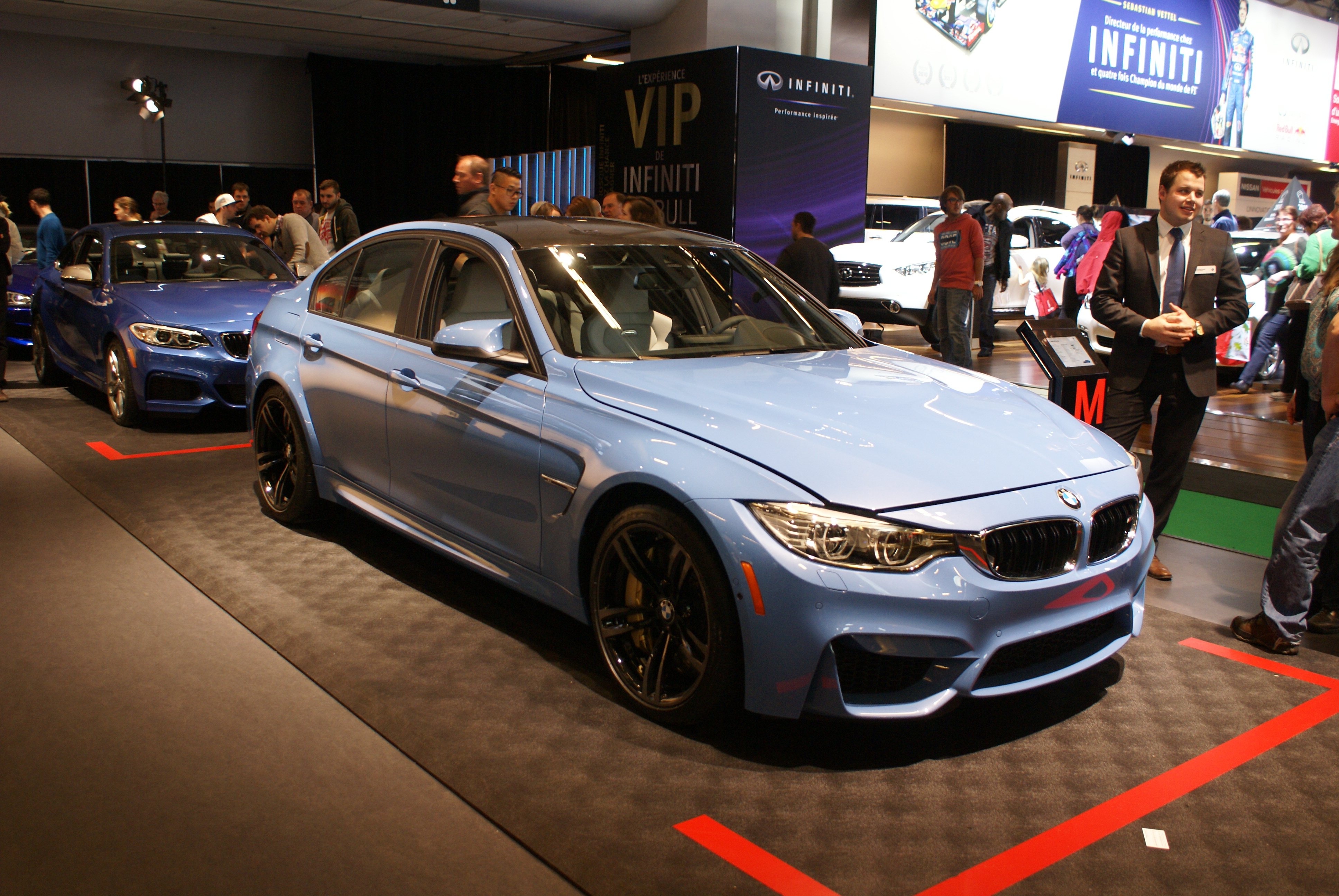 BMW M3 sedan at Salon International de l’auto de Montréal 2014